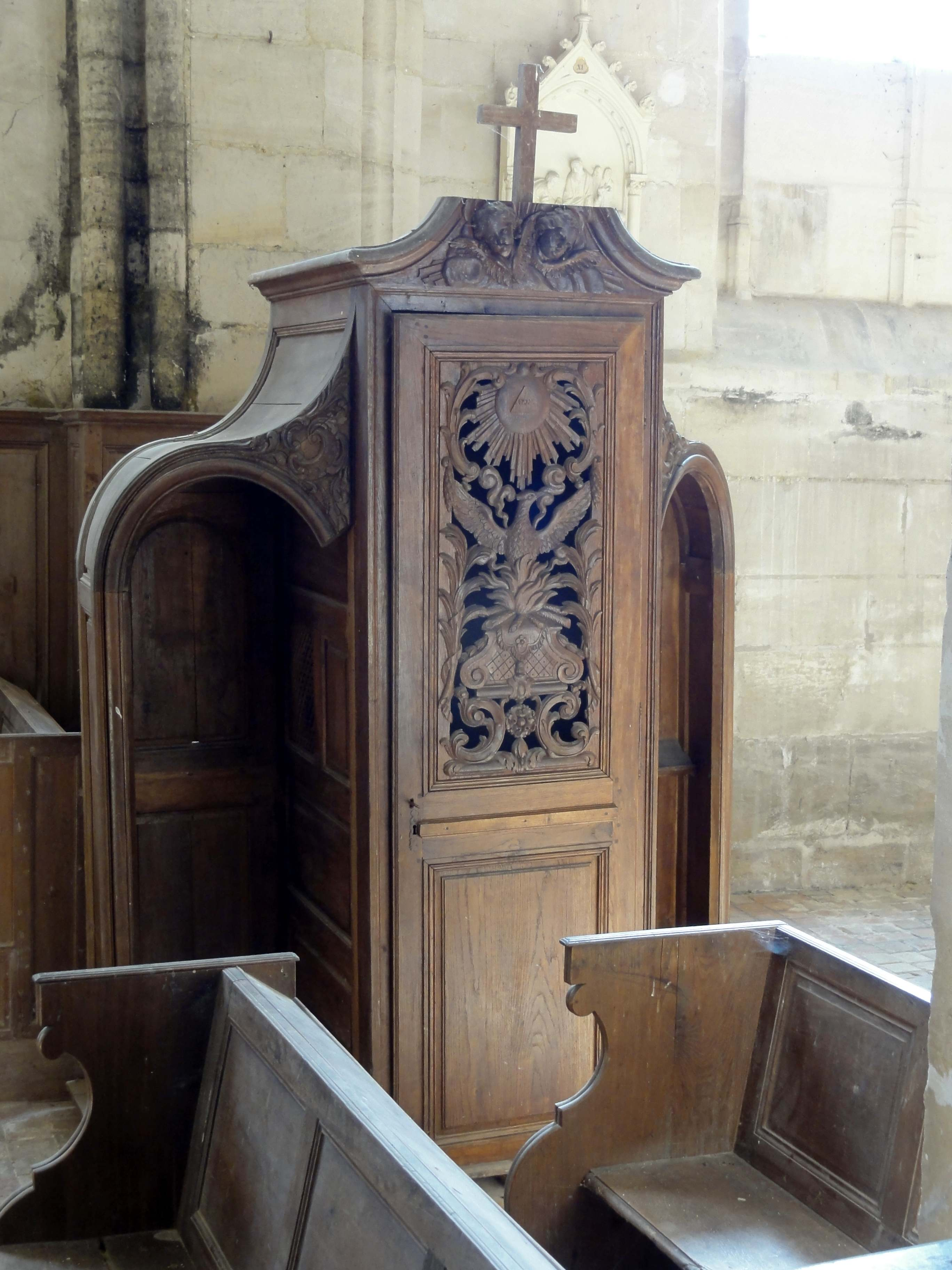 Mobilier de l'église - voir le titre du fichier.